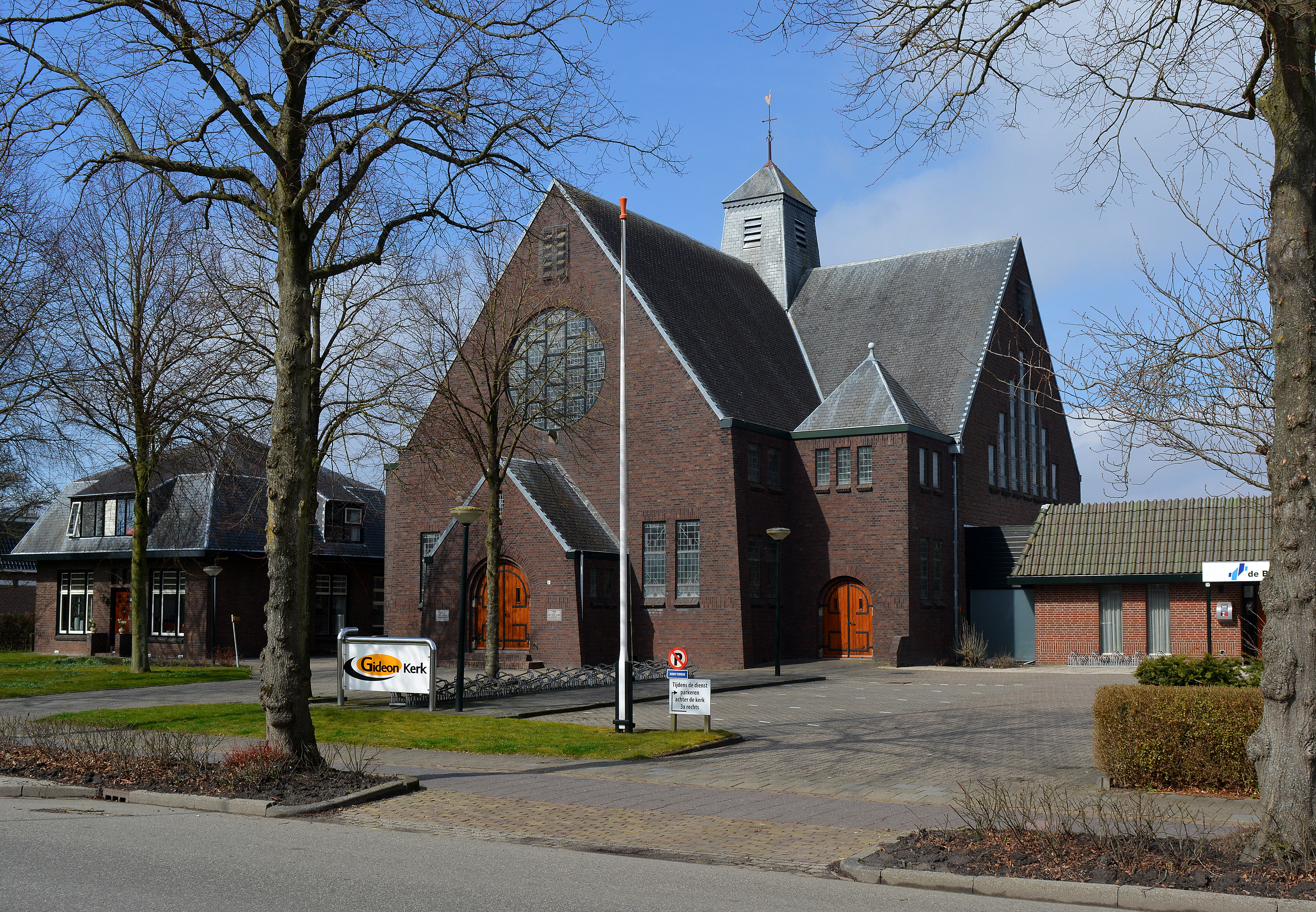 Gideontsjerke, Van Harenstrjitte 67, Sint Anne